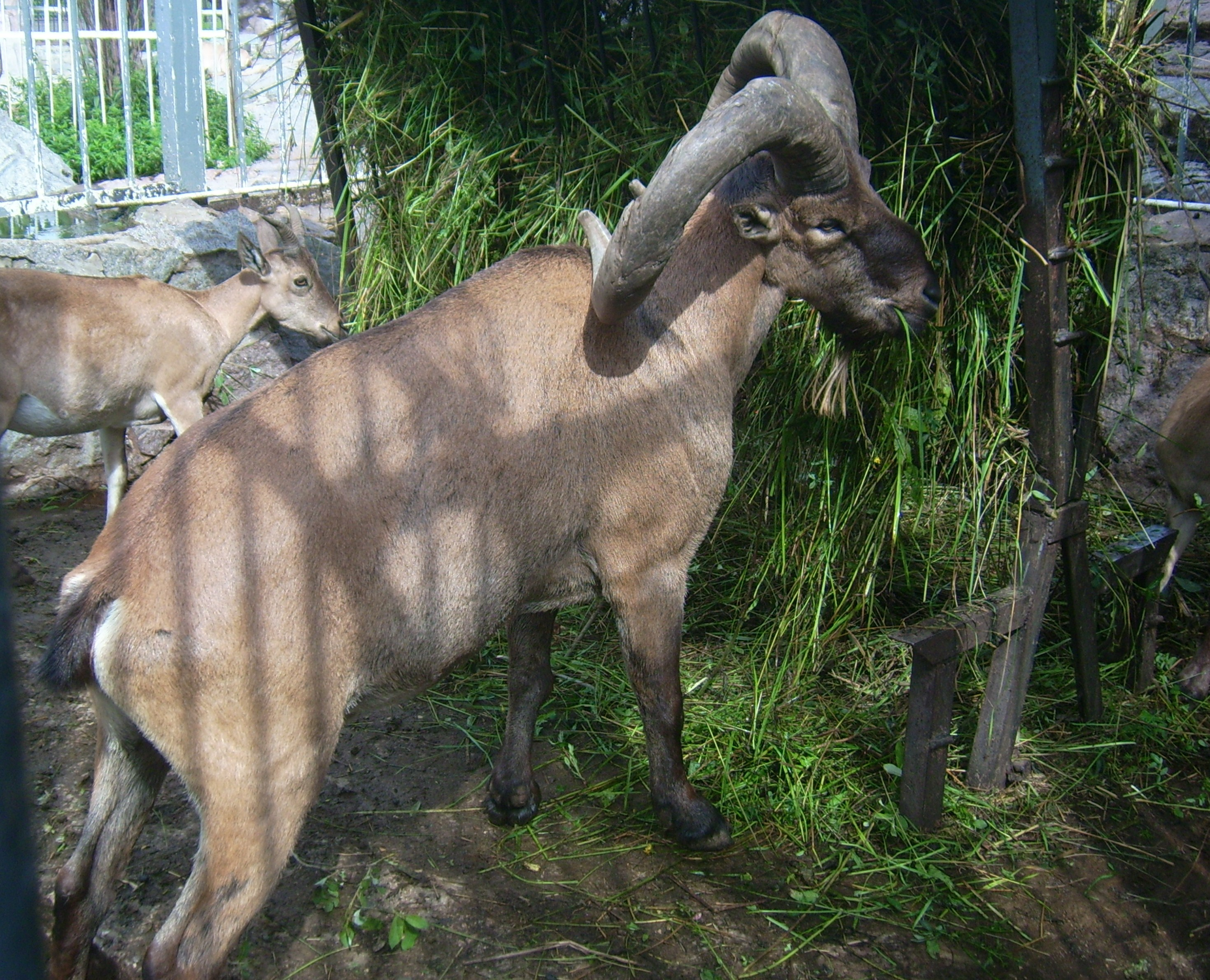 Capra cylindricornis at Moskau Zoo